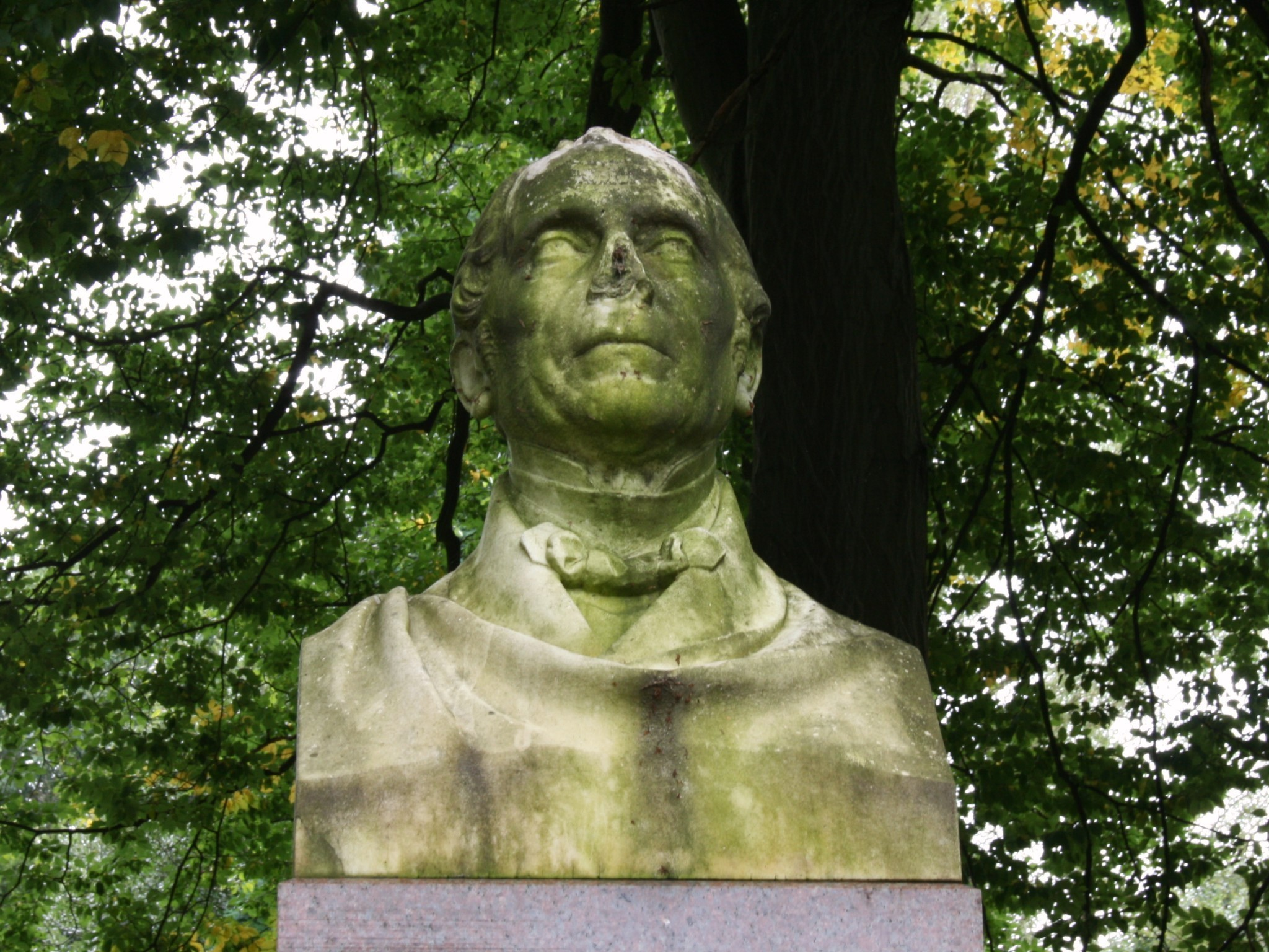 Wilhelm Werlé-Denkmal in den Barmer Anlagen in Wuppertal-Barmen